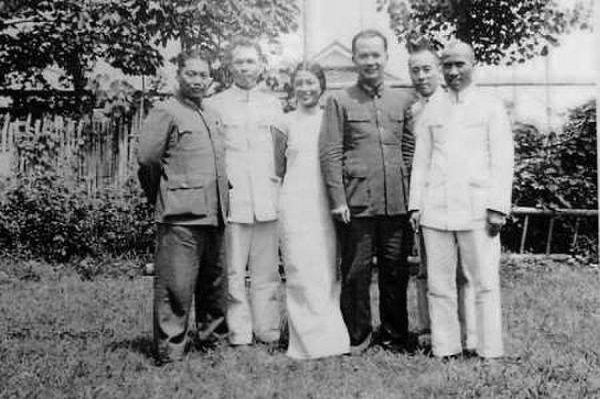 1936年末發生的“西安事變”，在中國共產黨的努力及抗日民族統一戰線政策的影響下得以和平解決，國民黨被迫和共產黨合作抗日。1937年8月，國共兩黨參加的國防會議在南京就合作抗日達成協議。21日，國共兩黨談判代表在中華民族解放行動委員會總書記黃琪翔的寓所合影。右起：朱德、周恩來、黃琪翔、黃琪翔夫人郭秀儀、葉劍英、張群。事后，周恩來、黃琪翔同任國民政府軍事委員會政治部副主任。